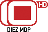 gbfvbvcvcvcv